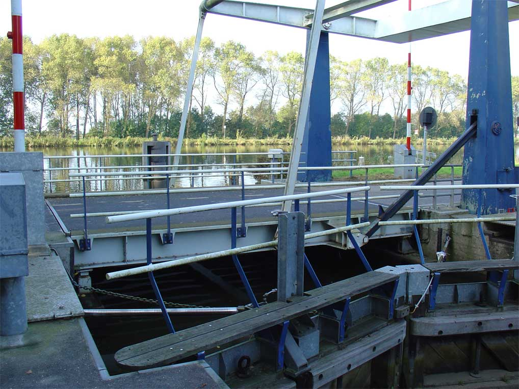 De brug over de Slochtersluis in het Slochterdiep bij het Eemskanaal (op de achtergrond zichtbaar)